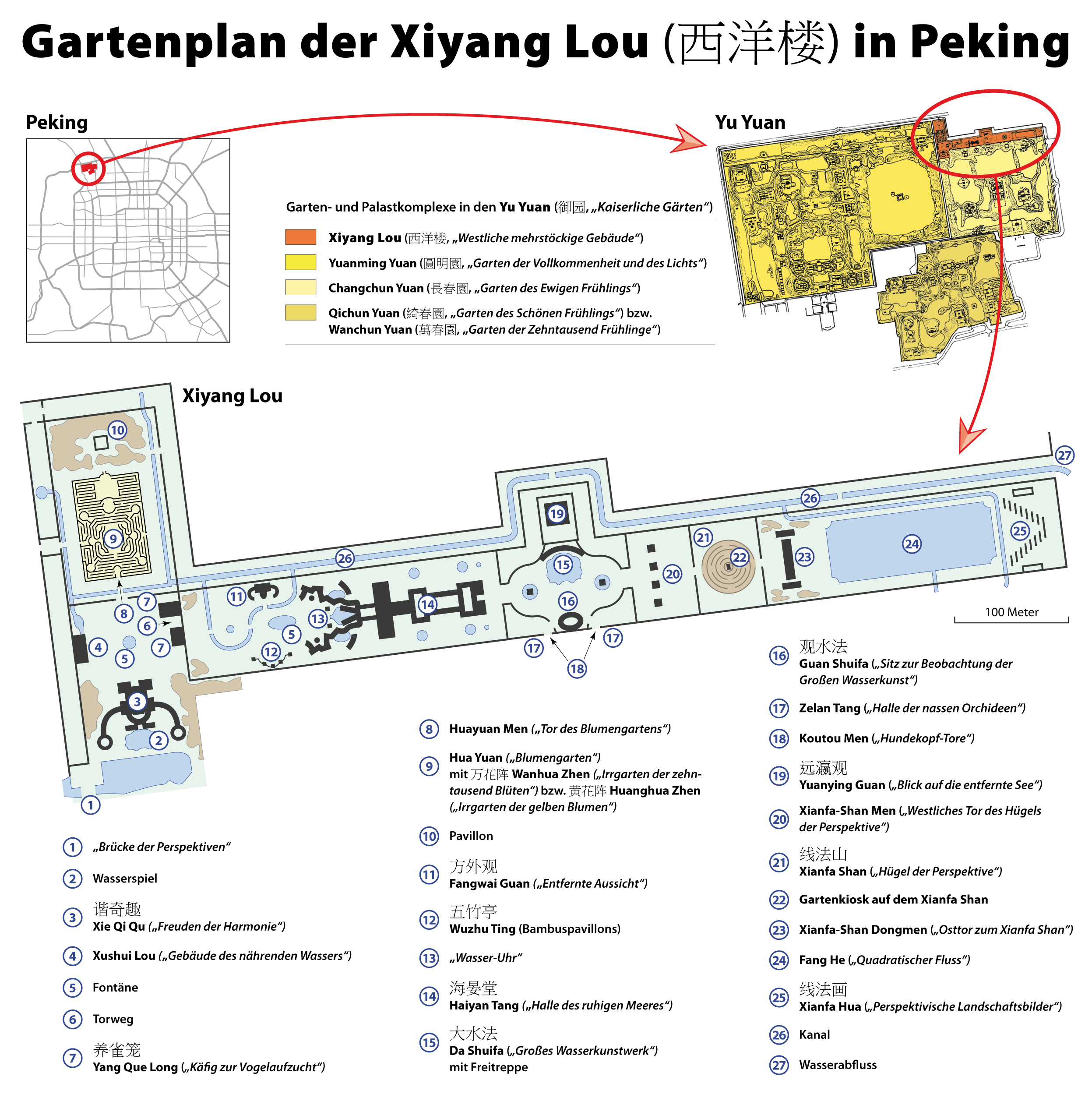 Gartenplan der Xiyang Lou in den Kaiserlichen Gärten von Peking